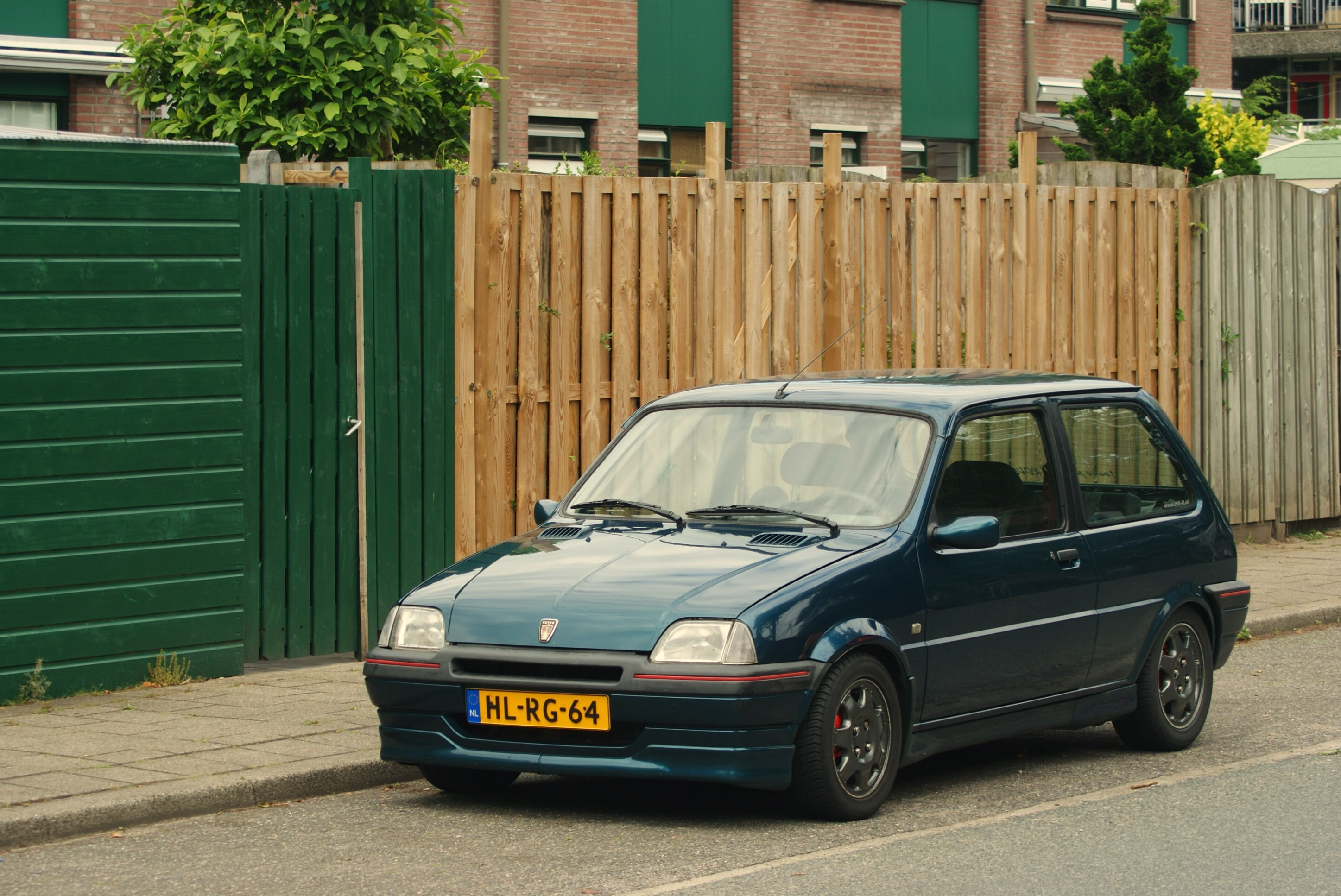 HL-RG-64